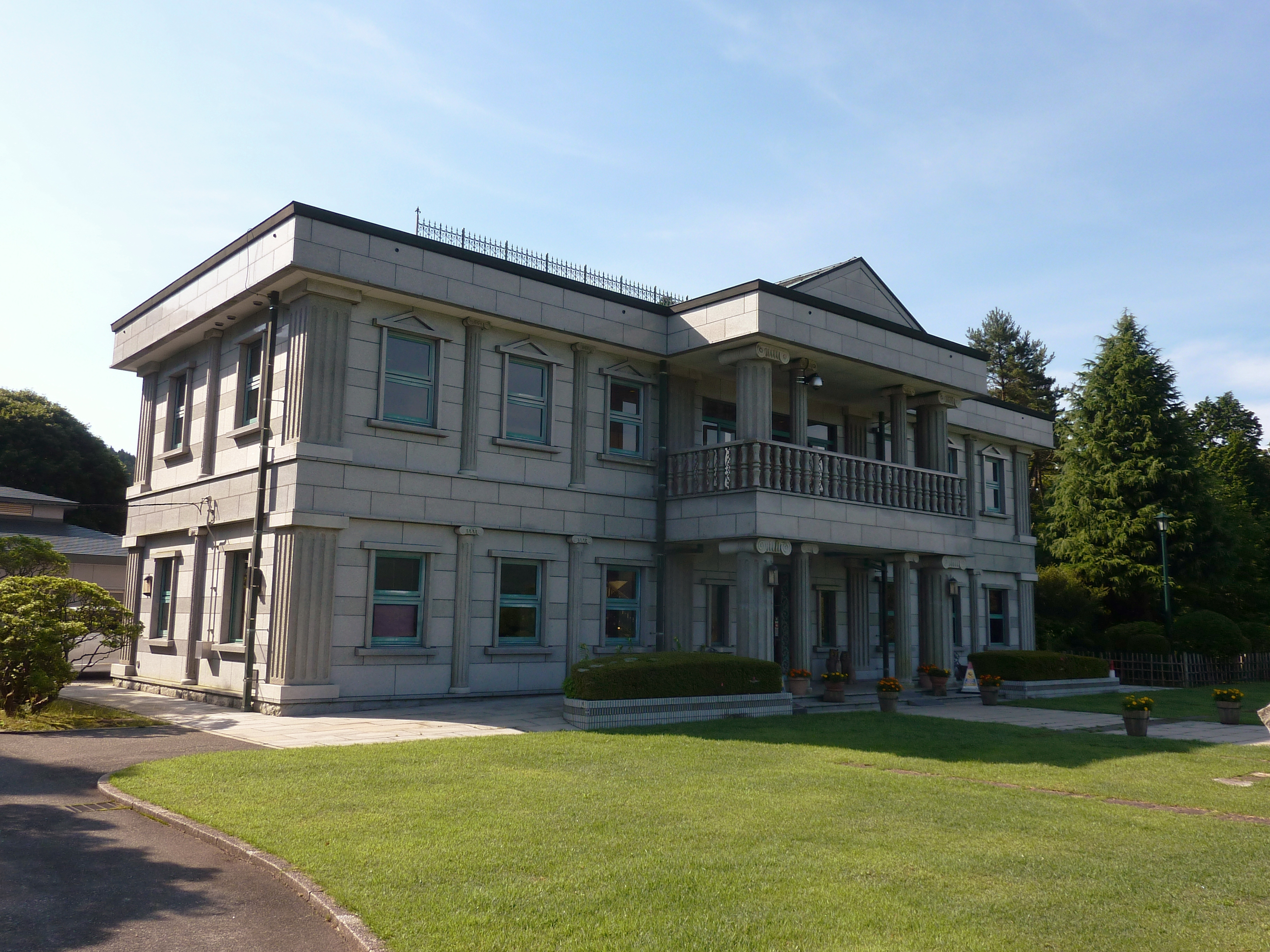 恩賜箱根公園の湖畔展望館